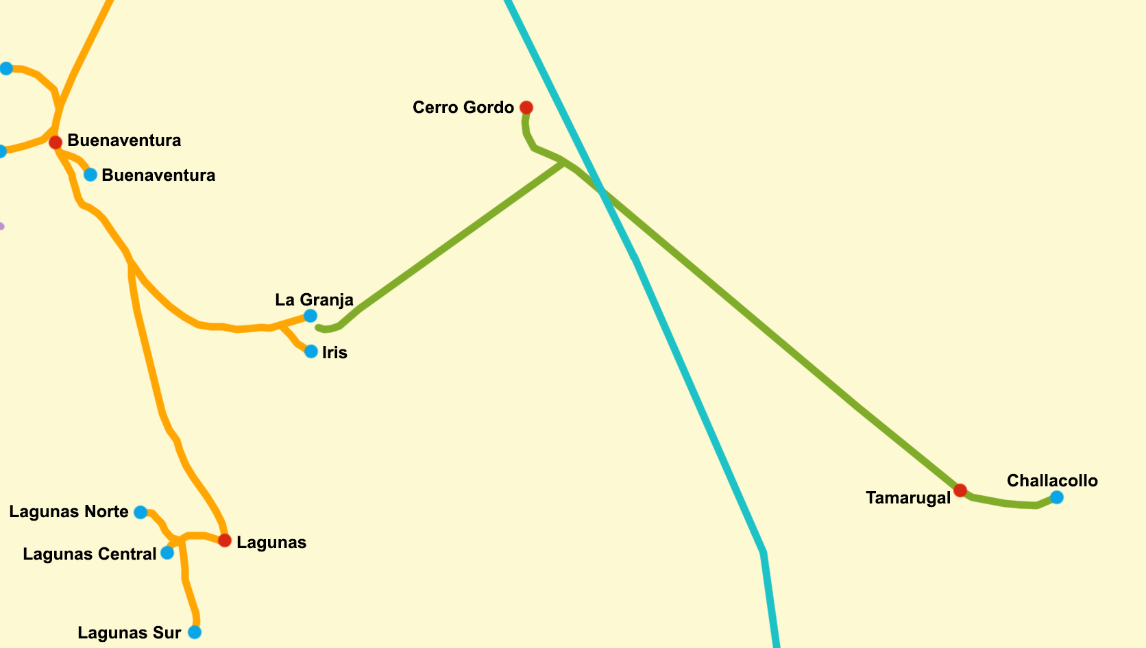 Mapa del trazado del Ferrocarril de Cerro Gordo (en color verde) hacia 1920. Las oficinas salitreras o yacimientos mineros aparecen marcadas en celeste y las estaciones en rojo, mientras que la línea naranja corresponde al Ferrocarril Salitrero de Tarapacá y la línea celeste al Ferrocarril Longitudinal Norte.